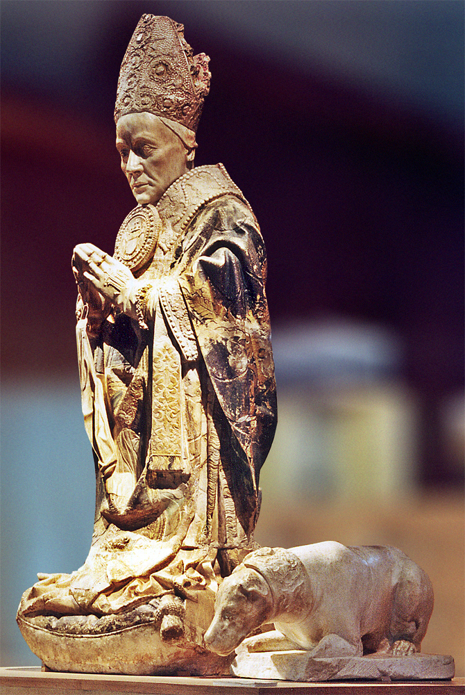 Obispo Barrientos, estatua orante (versión fotográfica). Se conserva en el Museo de las Ferias de Medina del Campo